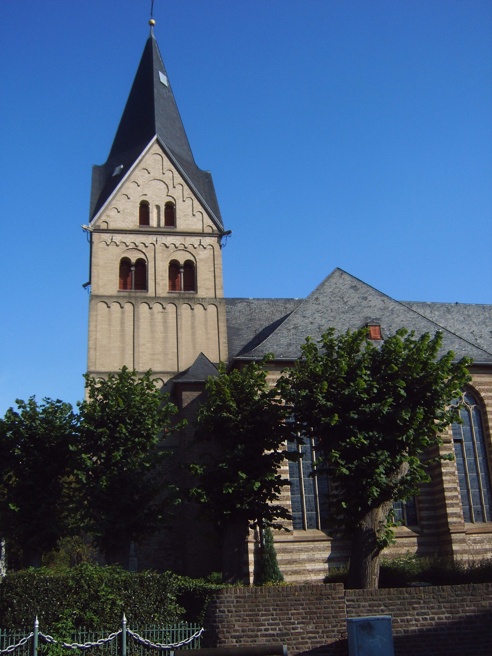 Sankt-Pankratius-Kirche in Paffendorf, Bergheim, Germany